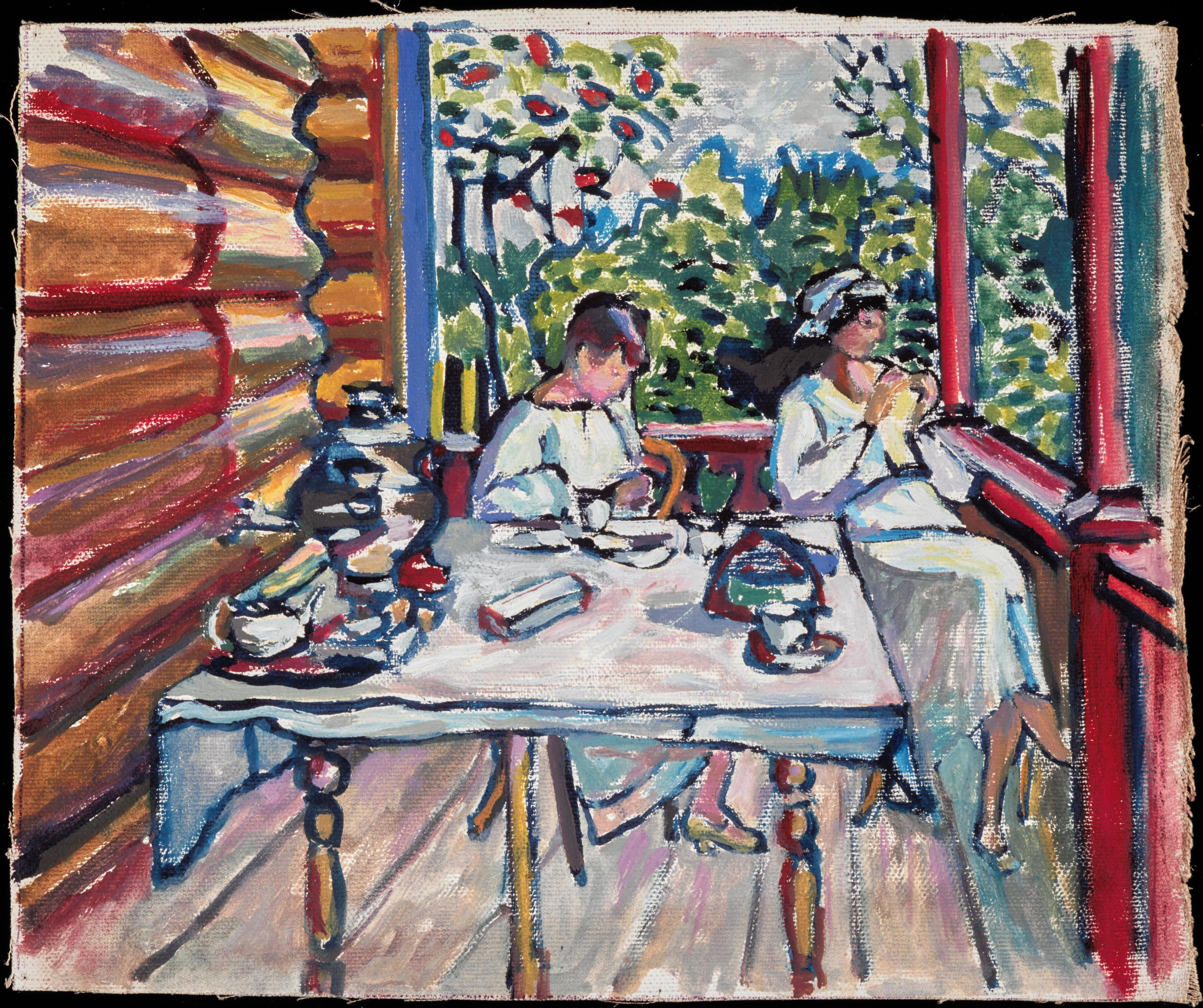 Nina Kandinsky (rechts mit Hut) und ihre Schwester auf dem Landsitz der Familie Abrikossow in Akhtyrka, 1917 siehe auch: Hans Konrad Röthel; Jean K. Benjamin: Kandinsky : Werkverzeichnis der Ölgemälde. 2. 1916 - 1944. München : Beck, 1984 ISBN 3-406-08892-9, # 622 (schwarz-weiß)